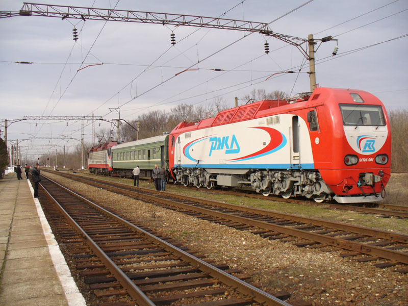 ЭП10-009, ЭП2К-001, ст. Ханская. см. фото 380779 в альбоме автора